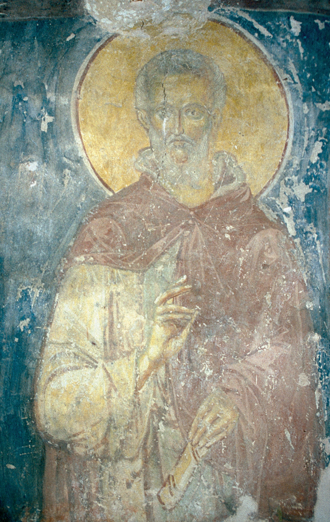 Фреска церкви Рождества Христова в Великом Новгороде. XIV век.